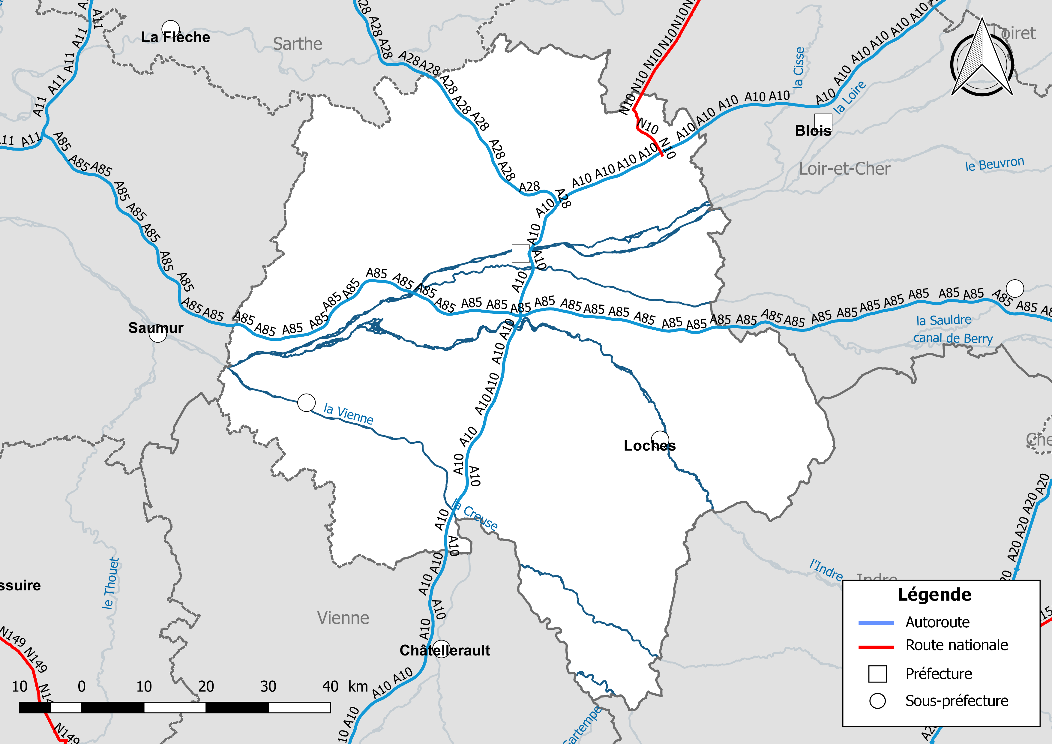 Carte du réseau routier national, constitué des autoroutes et des routes nationales, dans le département de l'Indre-et-Loire (France). Situation au 1er janvier 2019.